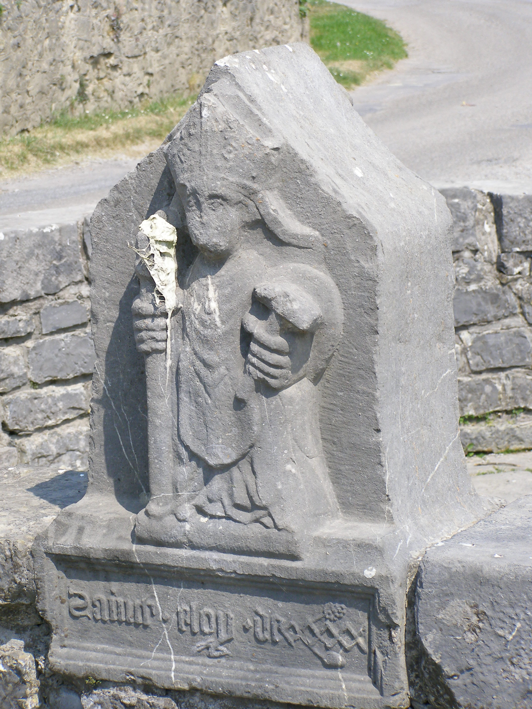 Statue de Saint Éloy, fontaine de Floursies.